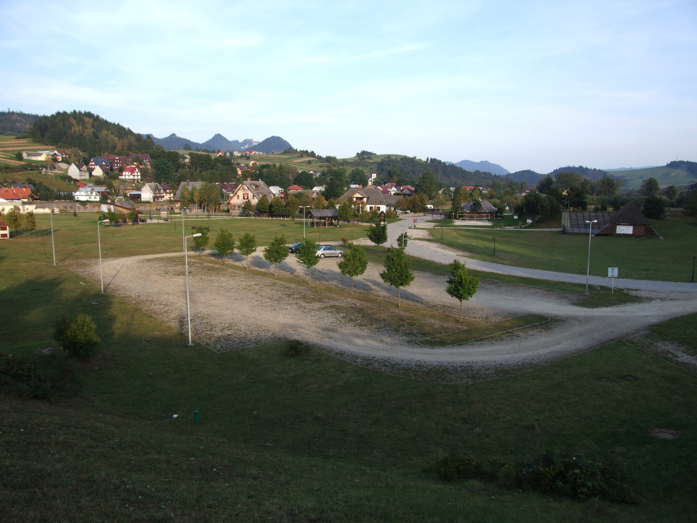 Polana Sosny w Niedzicy i centrum rekreacji i turystyki